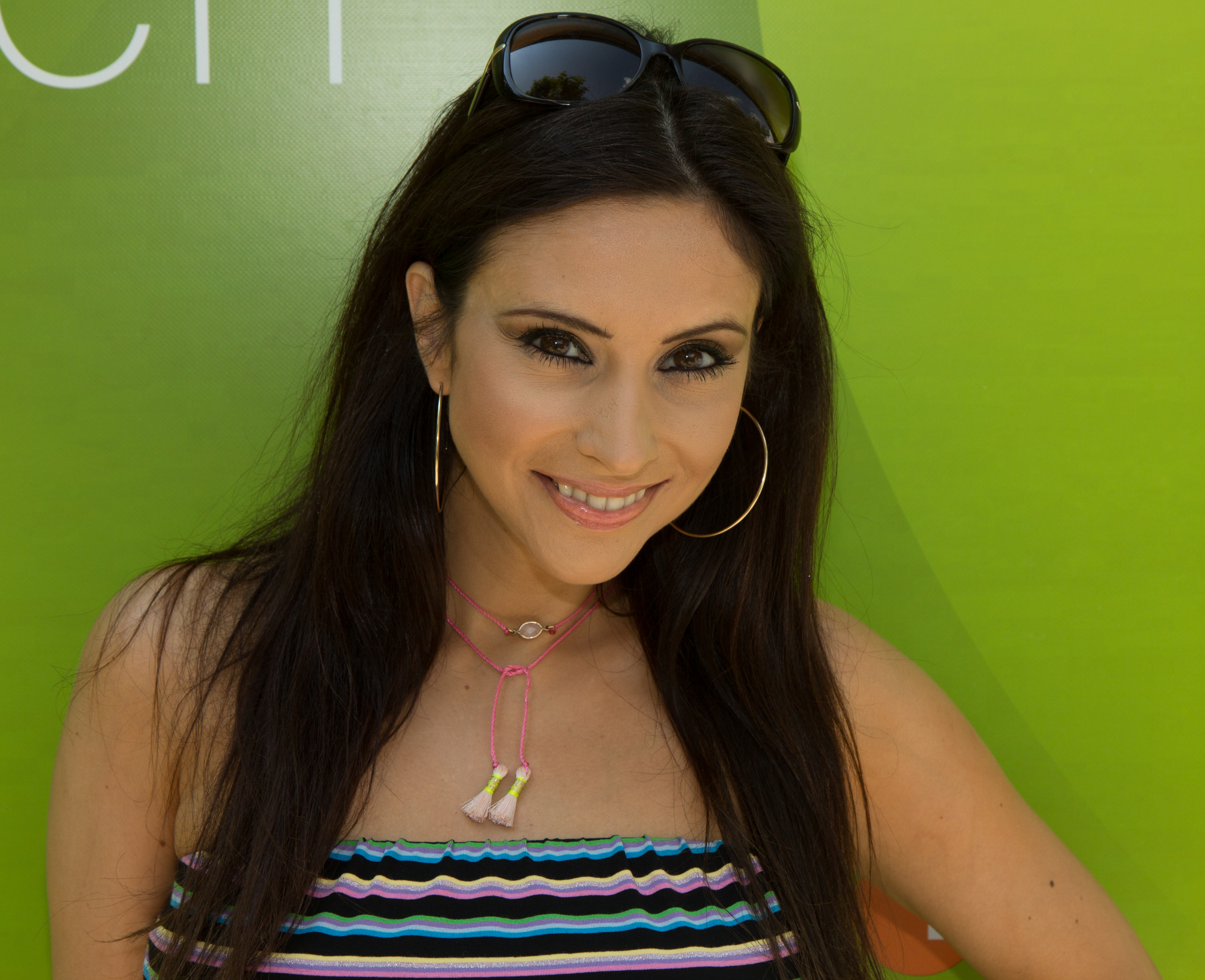 Diana Sorbello als Gast beim ZDF-Fernsehgarten am 10. Juni 2018 in Mainz.